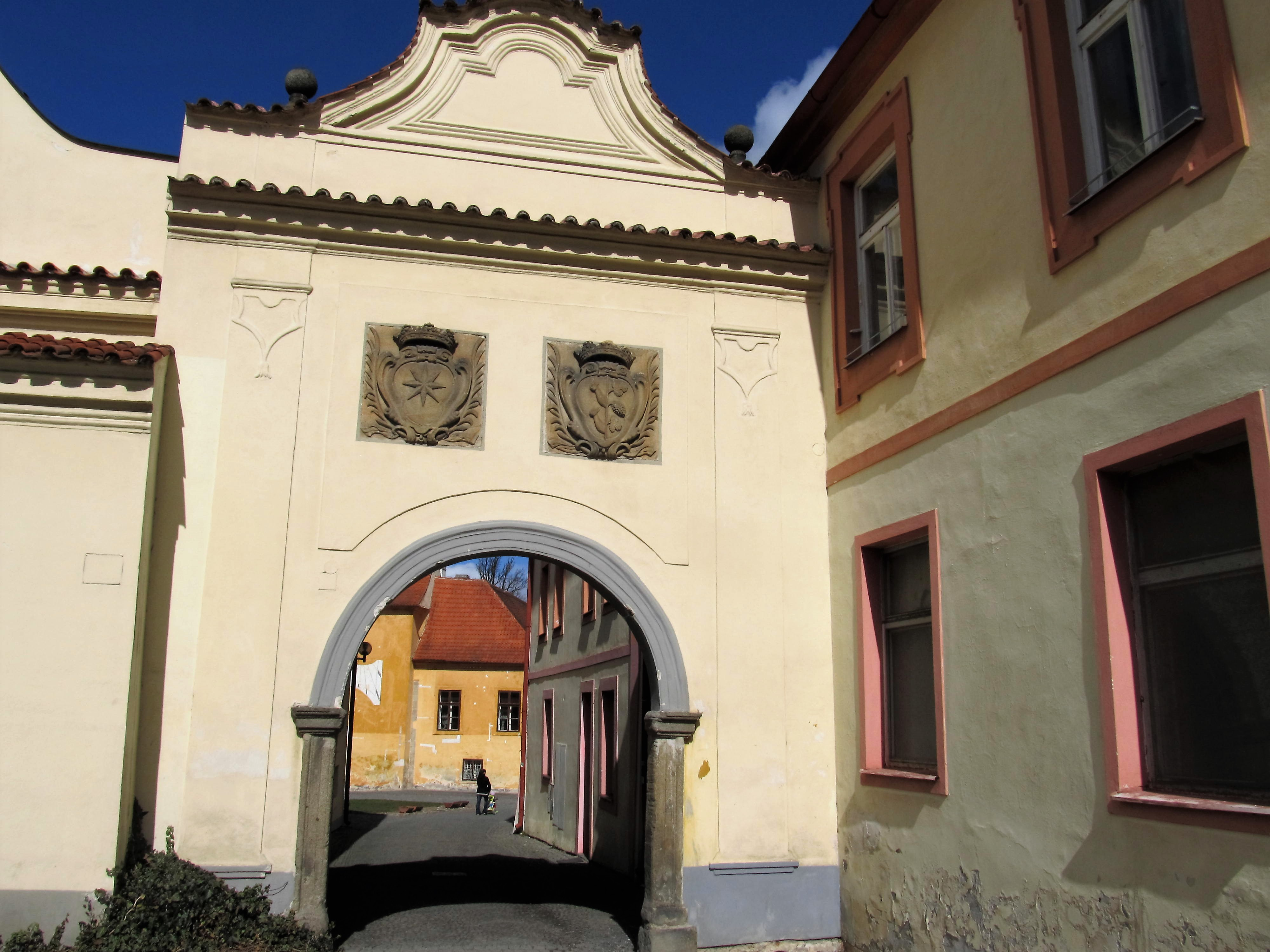 Vstupní brána do zámku z náměstí s erbem Šternberků a Maltzanů